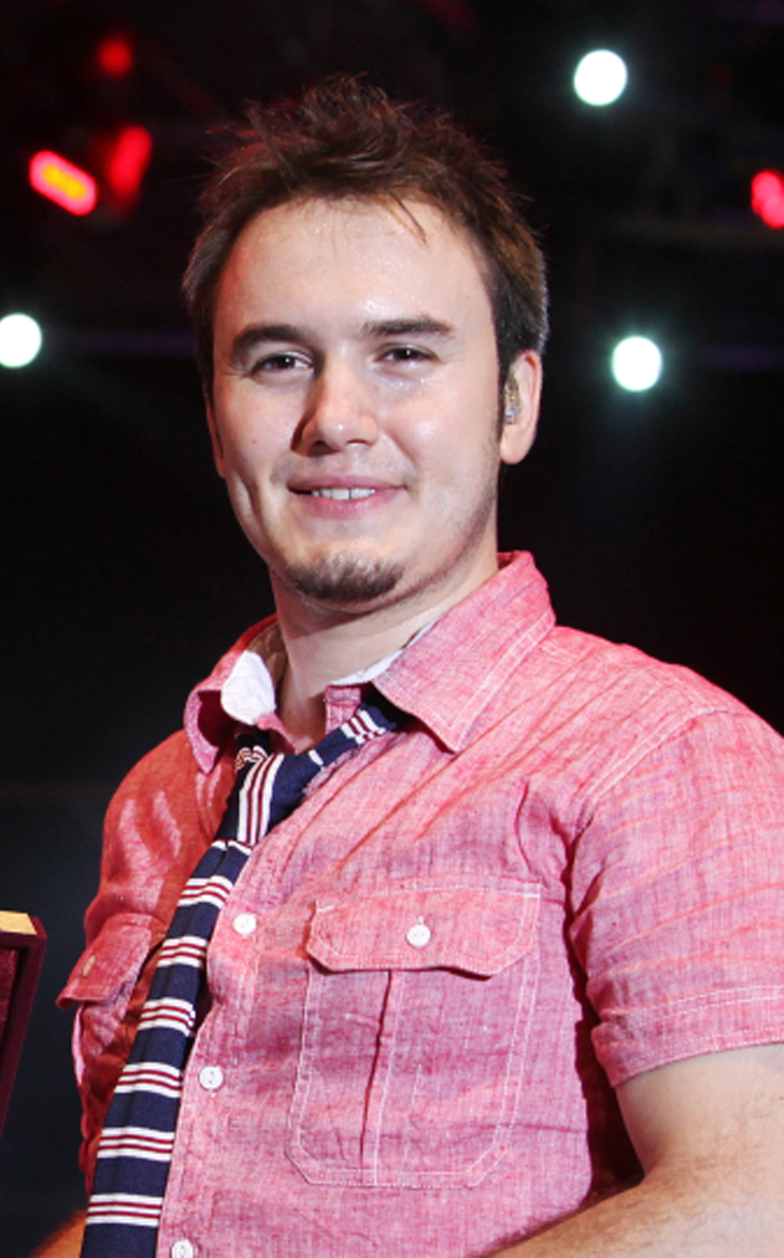 Sanatçı